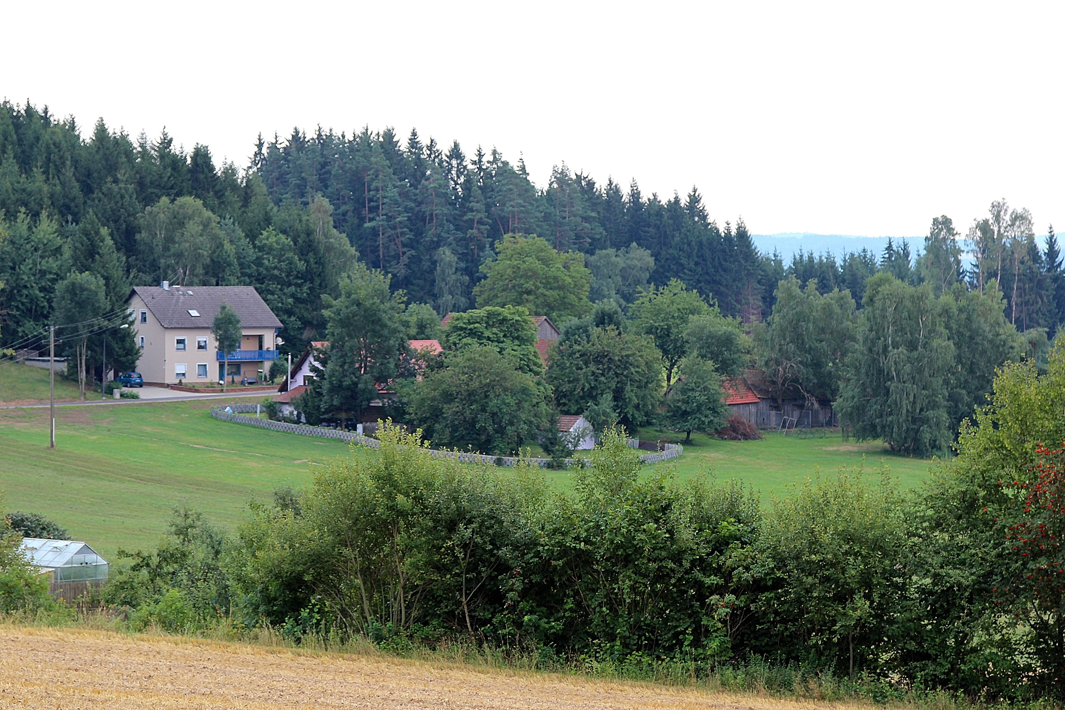 Ödhöfling ist ein Ortsteil der Gemeinde Niedermurach im Oberpfälzer Landkreis Schwandorf in Bayern.